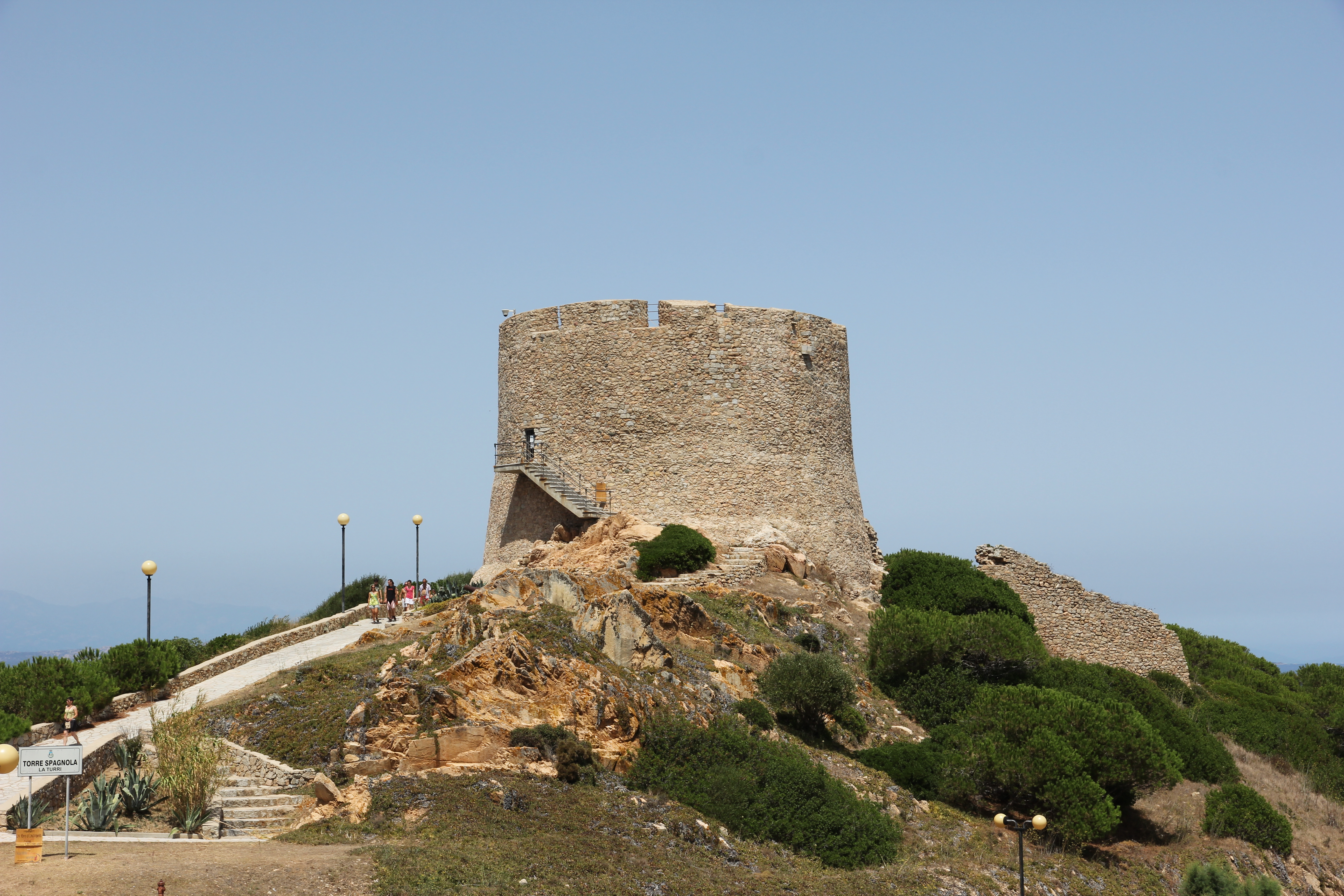 Santa Teresa Gallura - Torre di Longonsardo